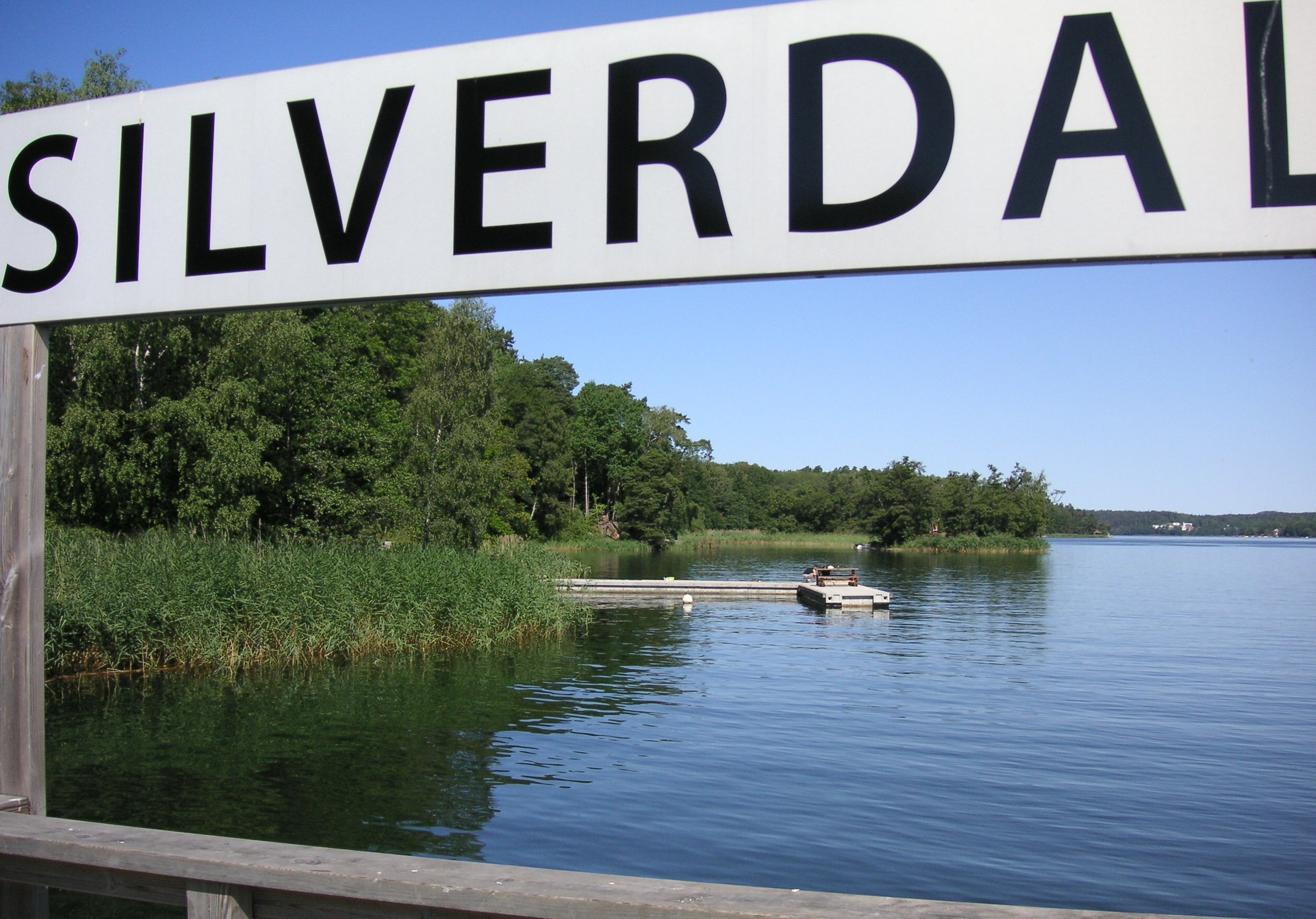 Edsviken vid Rådan, Sollentuna